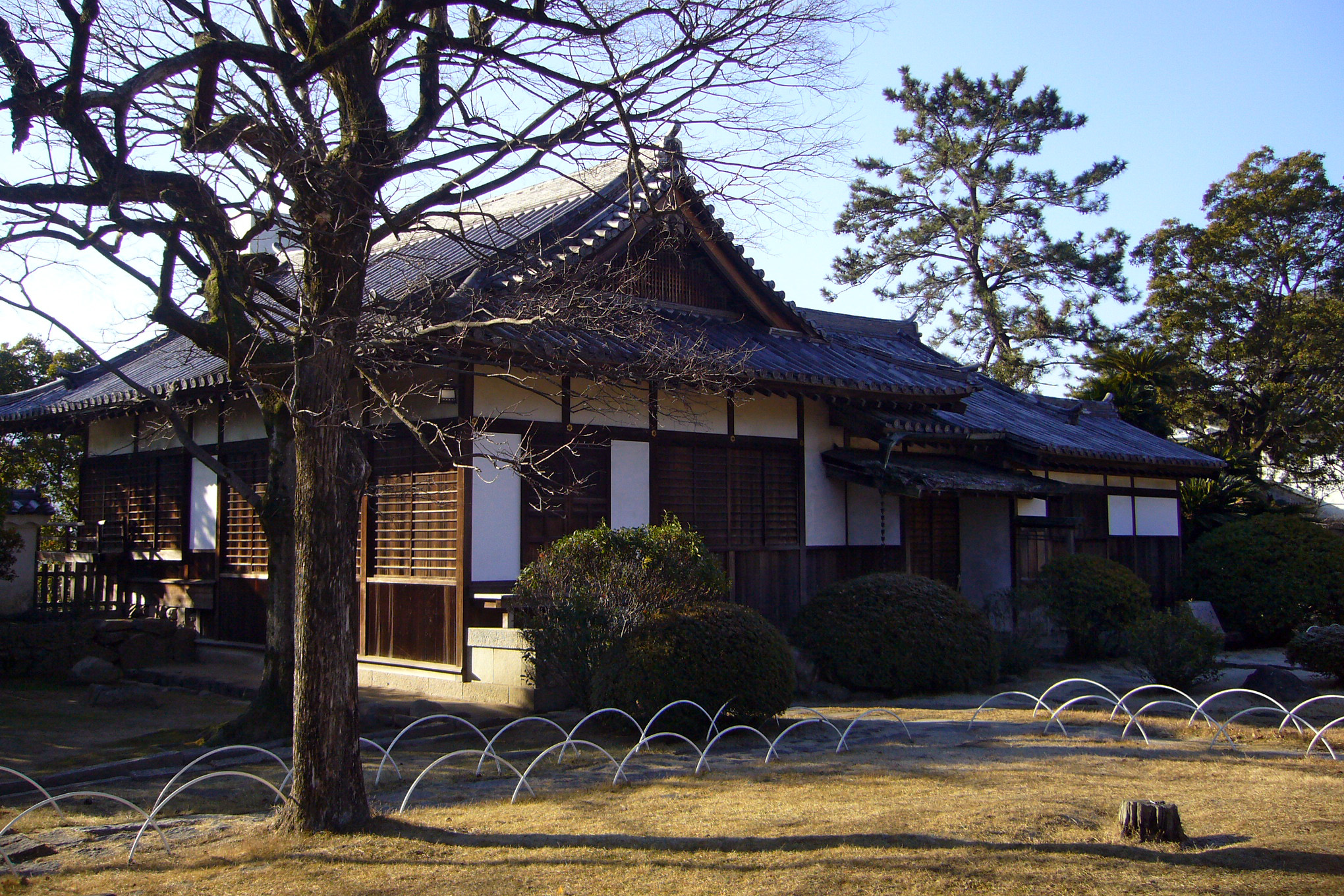 Fukuyama Castle "Yudono" in Fukuyama, Hiroshima prefecture, Japan